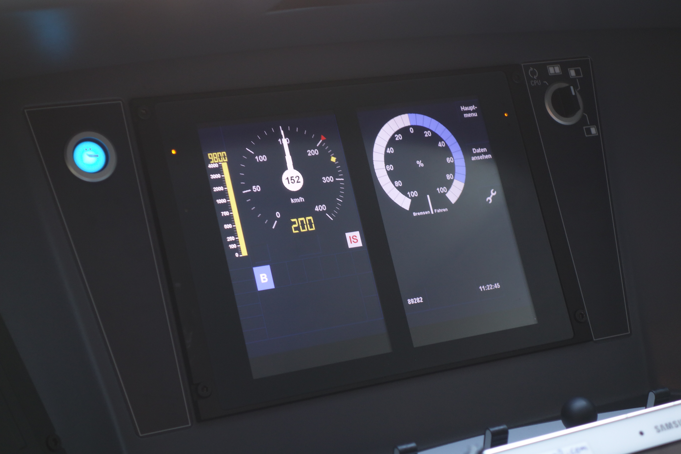 ICE 4 der Deutschen Bahn (Baureihe 412), Führerstands-Display LZB